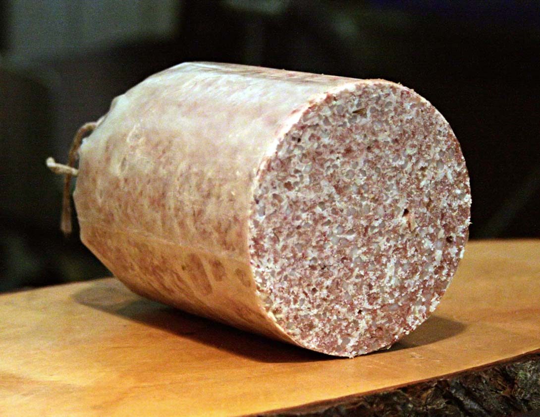 Wurstebrei (Metzgerei Klaus, Versmold) vorm Braten